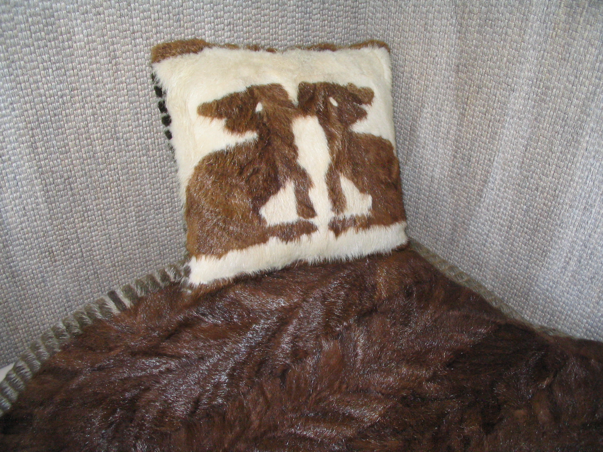 Decke und Kissen aus Nutriastücken. Lehrlingsarbeit von Thomas Pflüger, Schwetzingen. In der Firma Herhold Pelze, Wiesbaden (abgebildet das Firmenlogo). Gearbeitet 1987 oder früher.